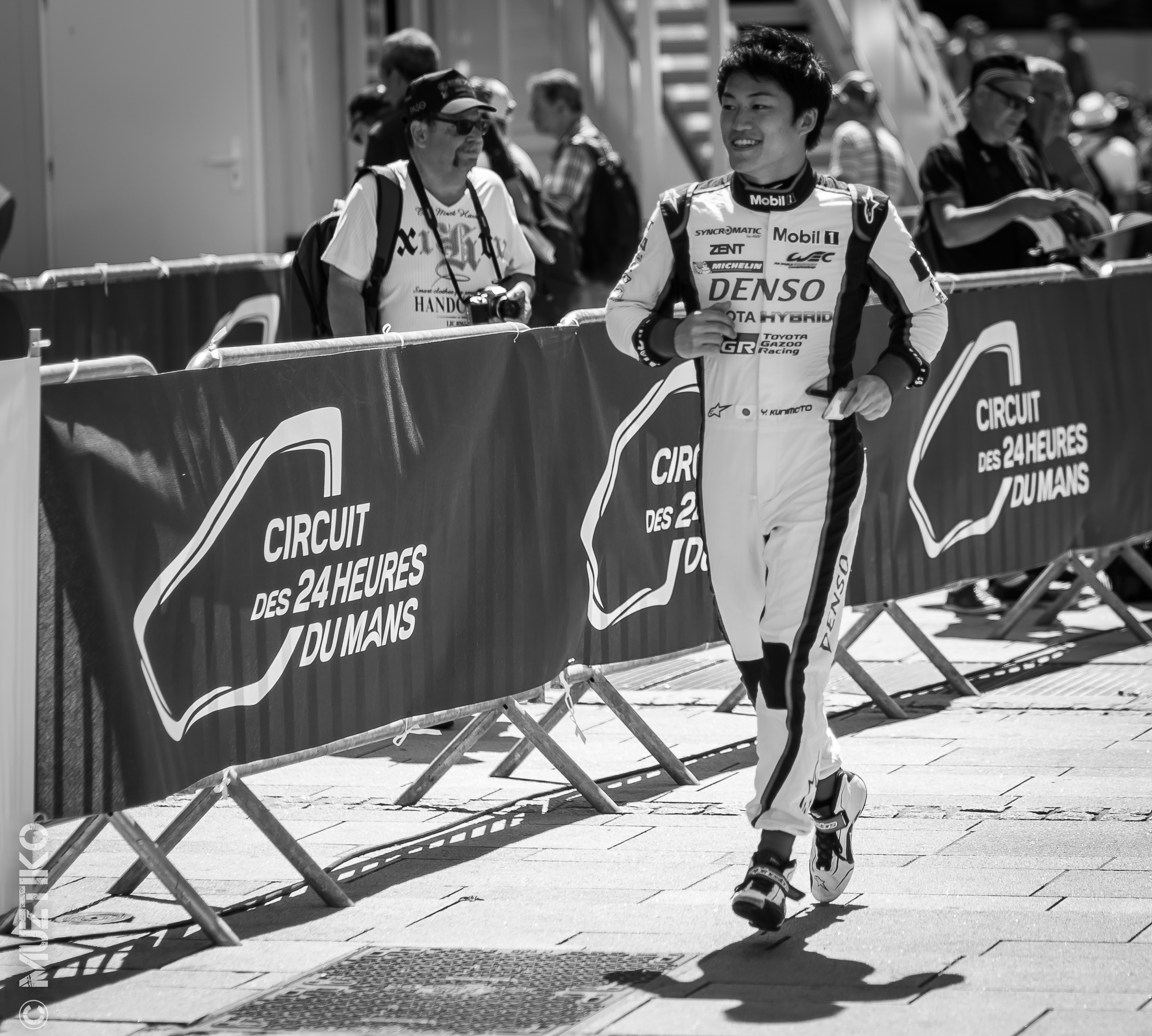 Yuji Kunimoto, 24h du Mans 2017